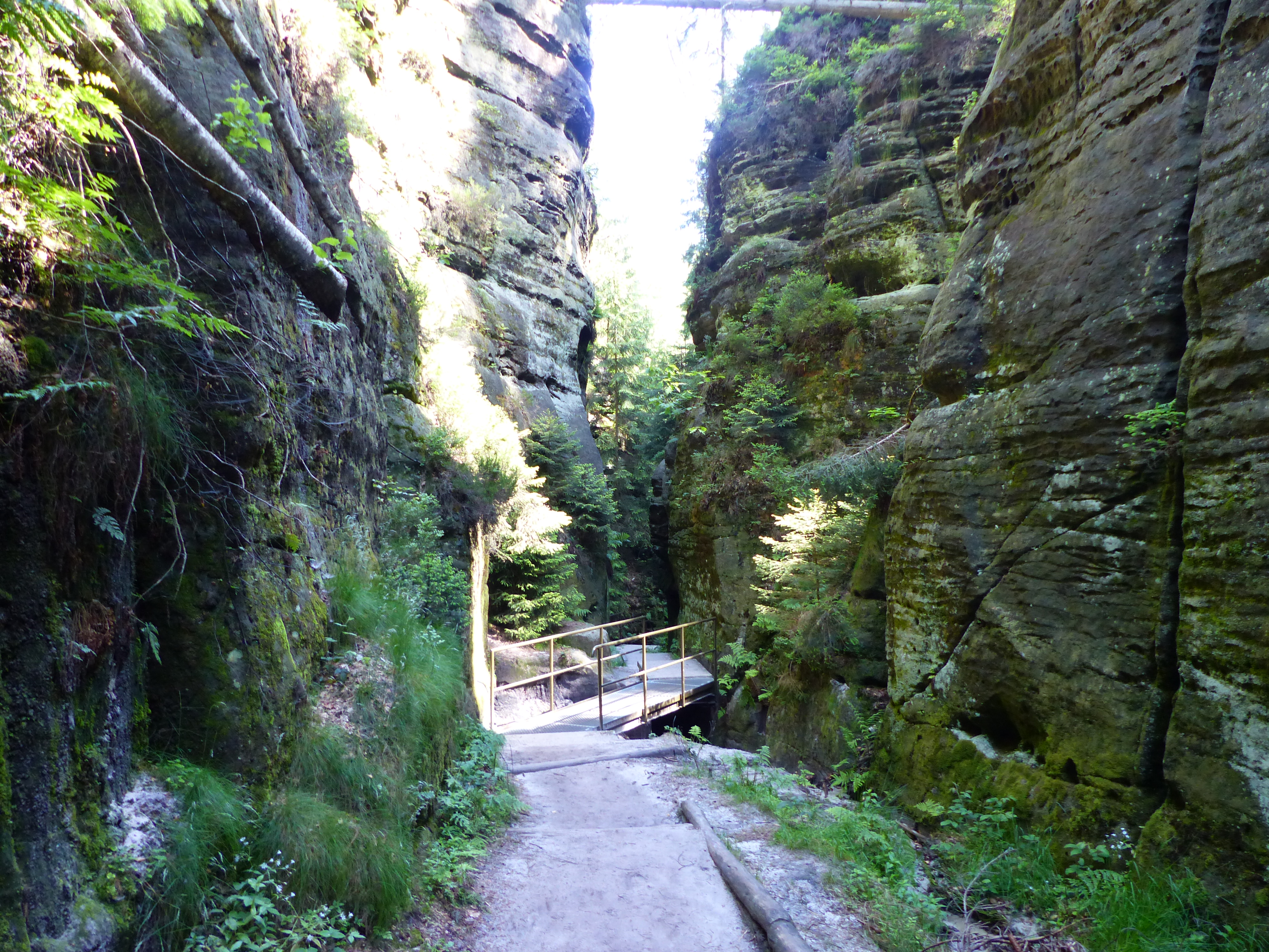 Schwedenlöcher bei Rathen und Bastei im Nationalpark Sächsische Schweiz